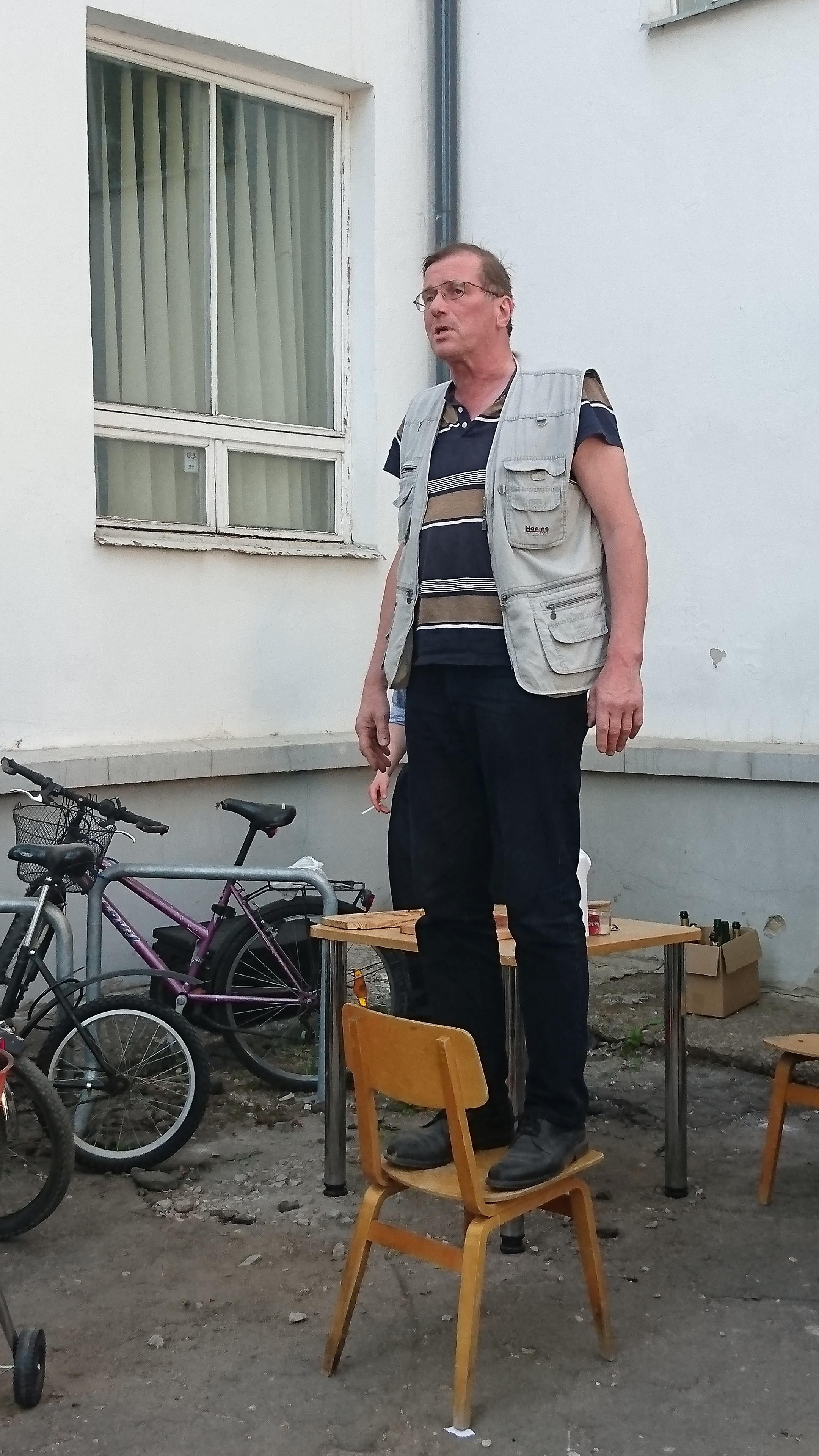 Kunstiajaloolane Enriko Talvistu Tartu Kunstimaja õuel, pidamas kõnet kuraator Indrek Grigori lahkumise puhul Tartu Kunstimajast, 25. mai 2018.